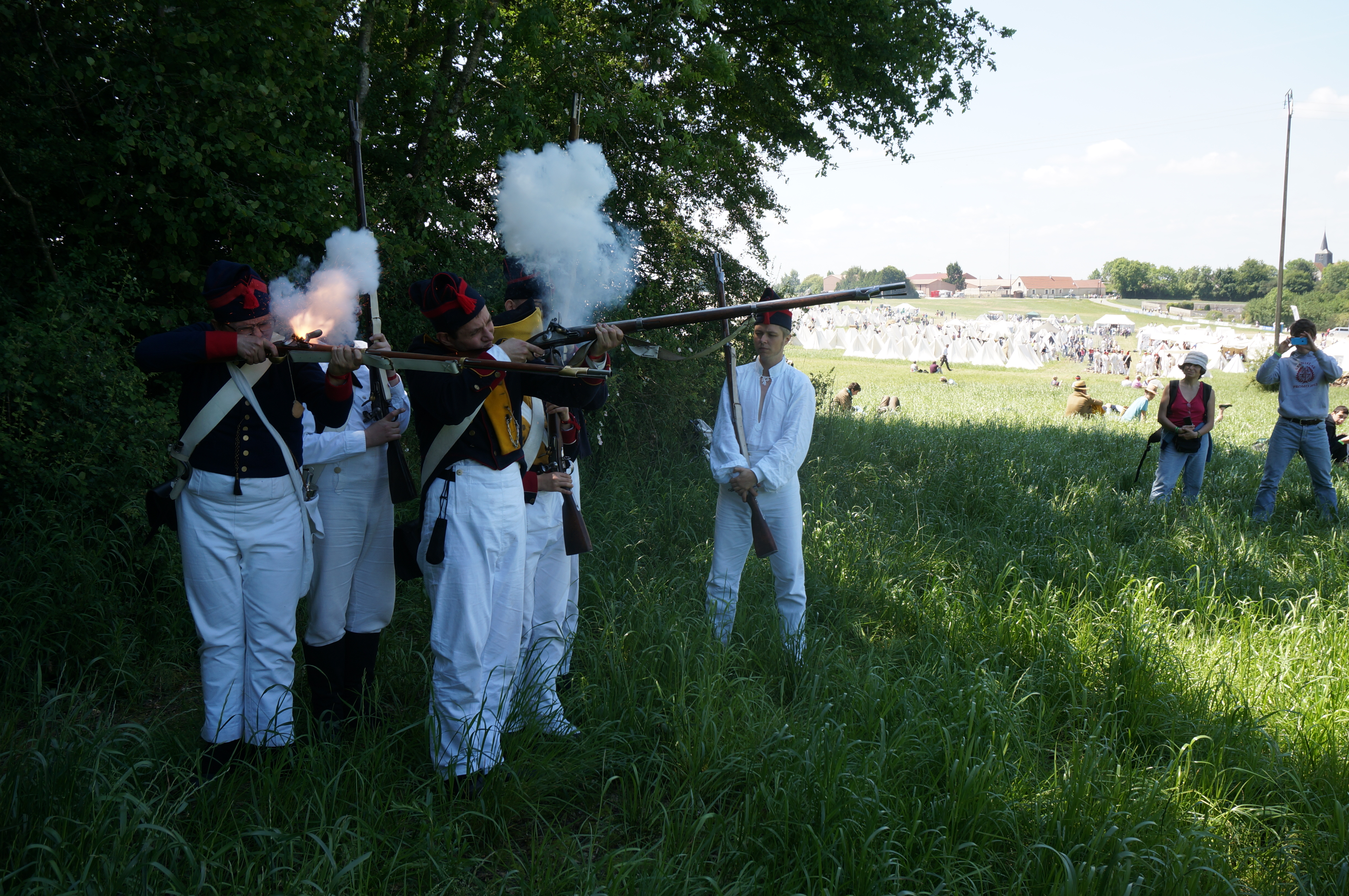 Lors de la reconstitution du bi-centenaire de la bataille de Montmirail.